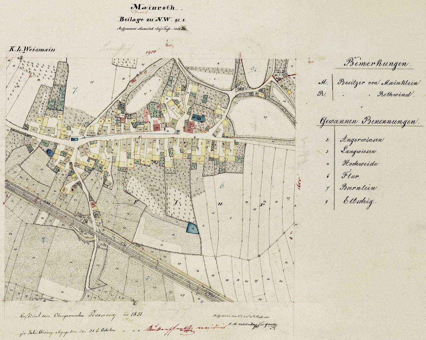 Ortsplan von Mainroth, M 1:2500